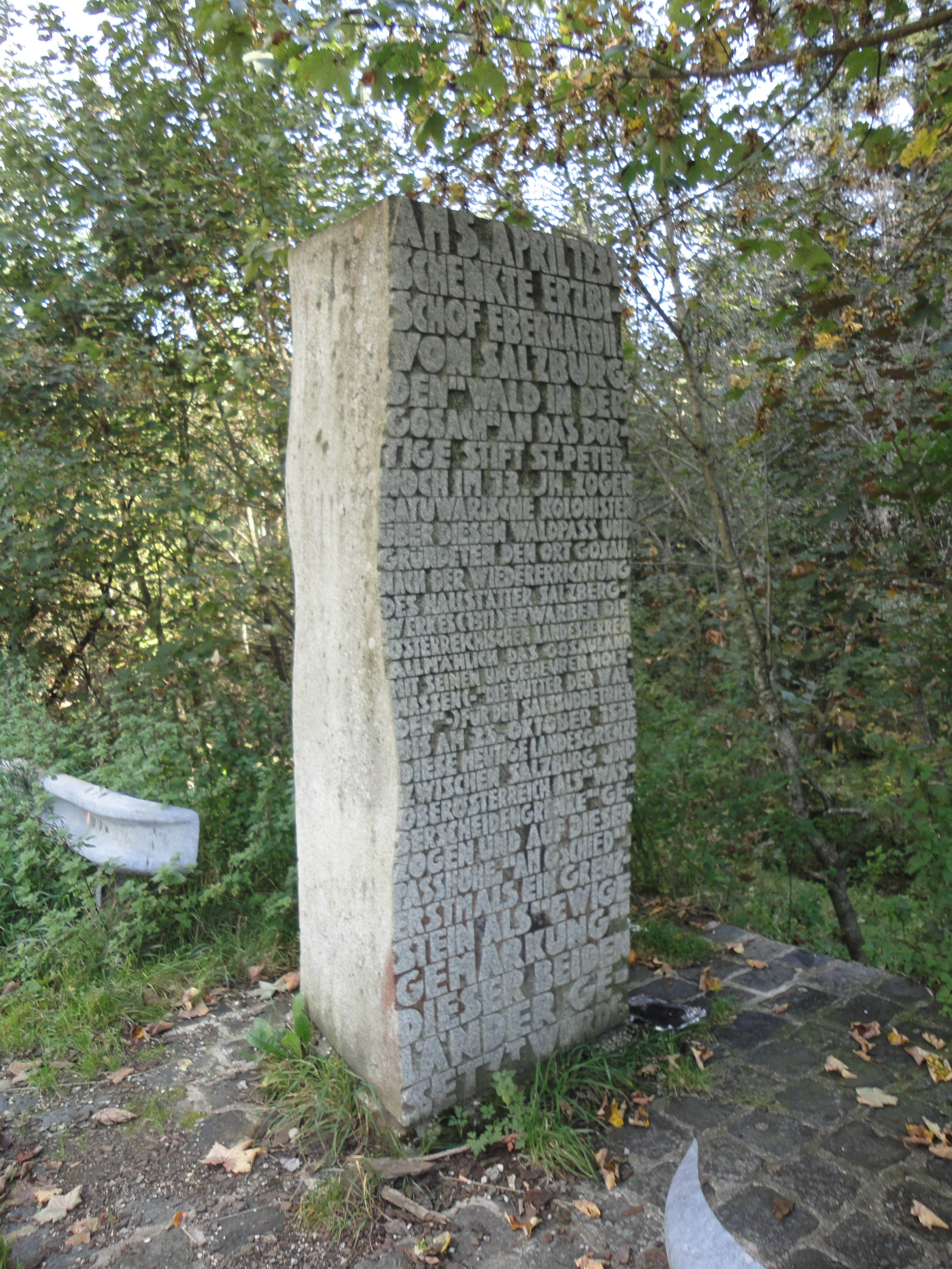 Grenzstein